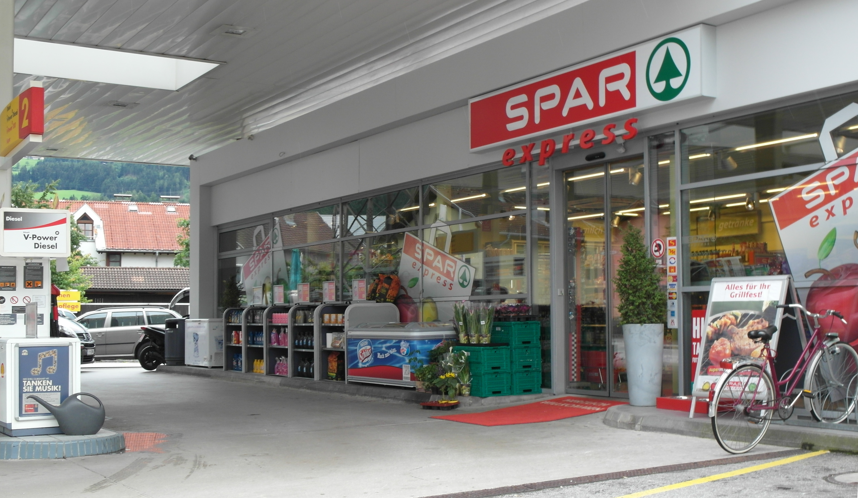 Spar Express Markt an der Shell-Tankstelle in Wattens